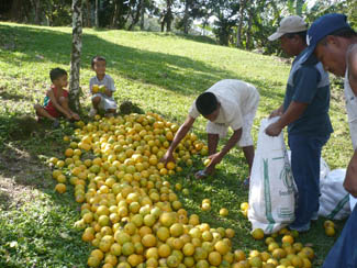 tipos de actividades economicas